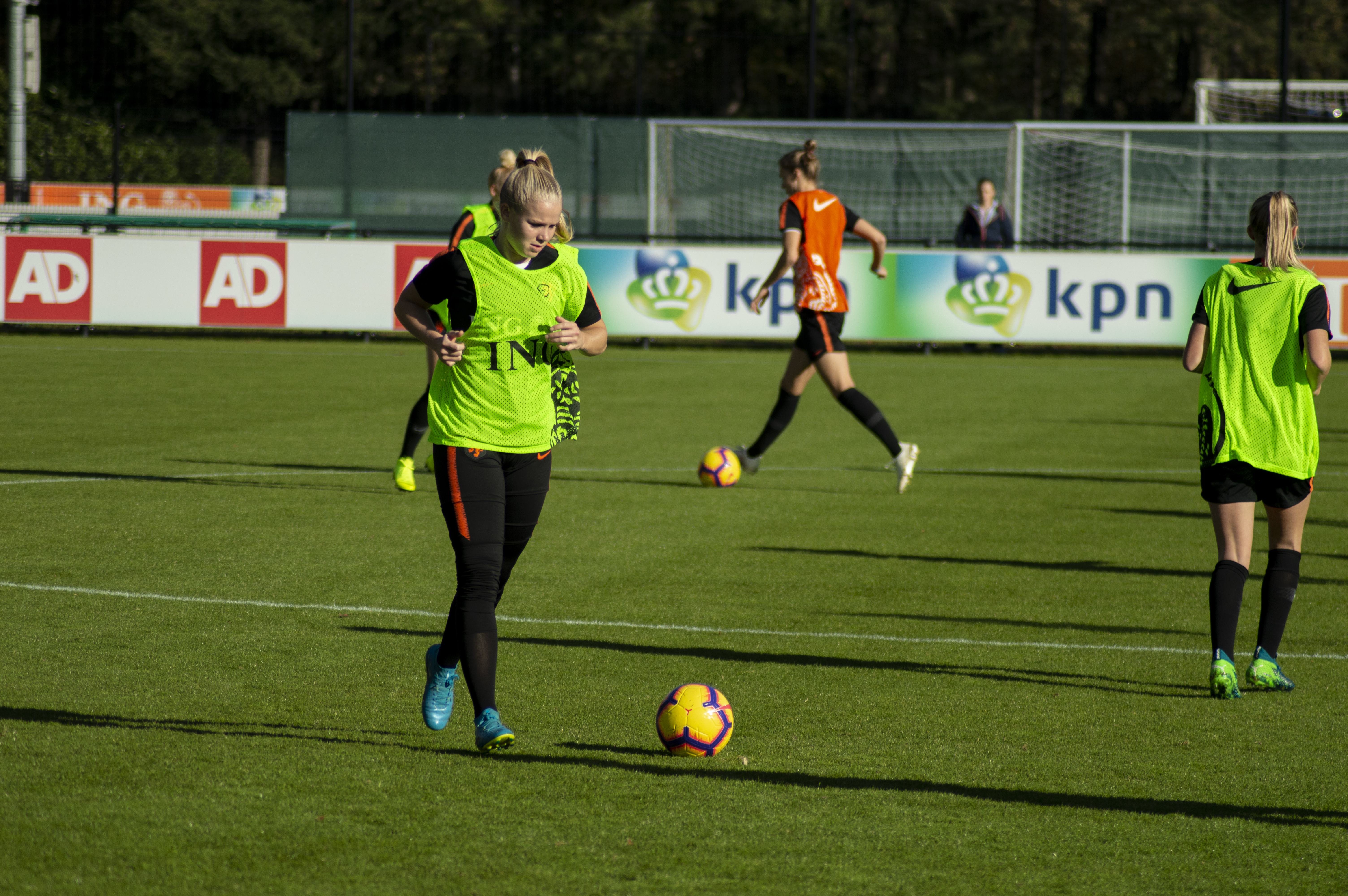 Kika van Es